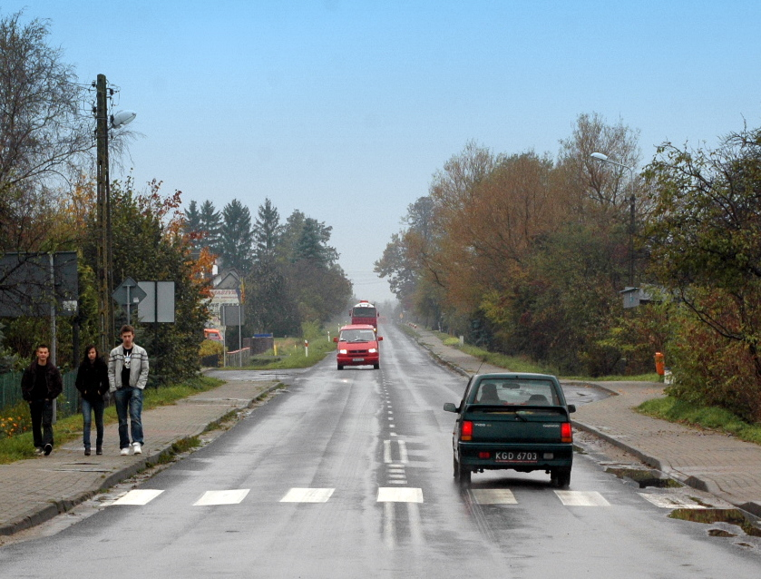 Droga wojewódzka nr 163w Dygowie. Kierunek Kołobrzeg.